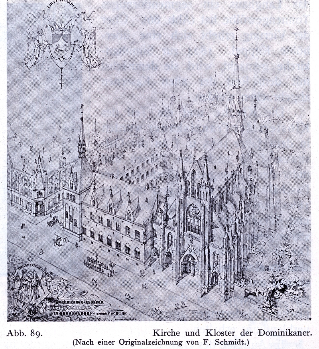 Dominikanerkloster an der Herzogstraße in Düsseldorf, 1867 bis 1887, Dombaumeister Friedrich von Schmidt aus Wien, Zeichnung.jpg